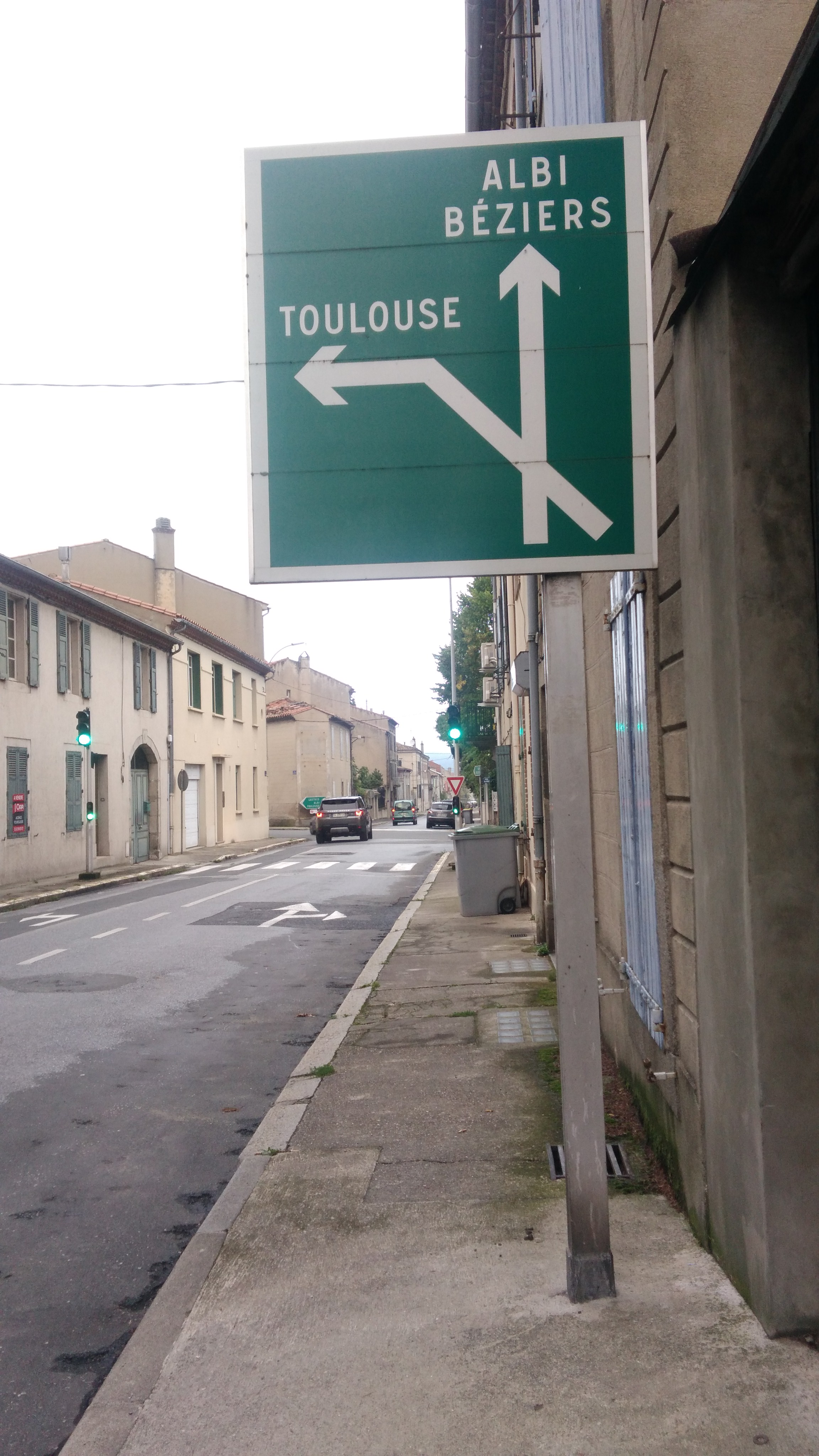 panneau D42b à fond vert